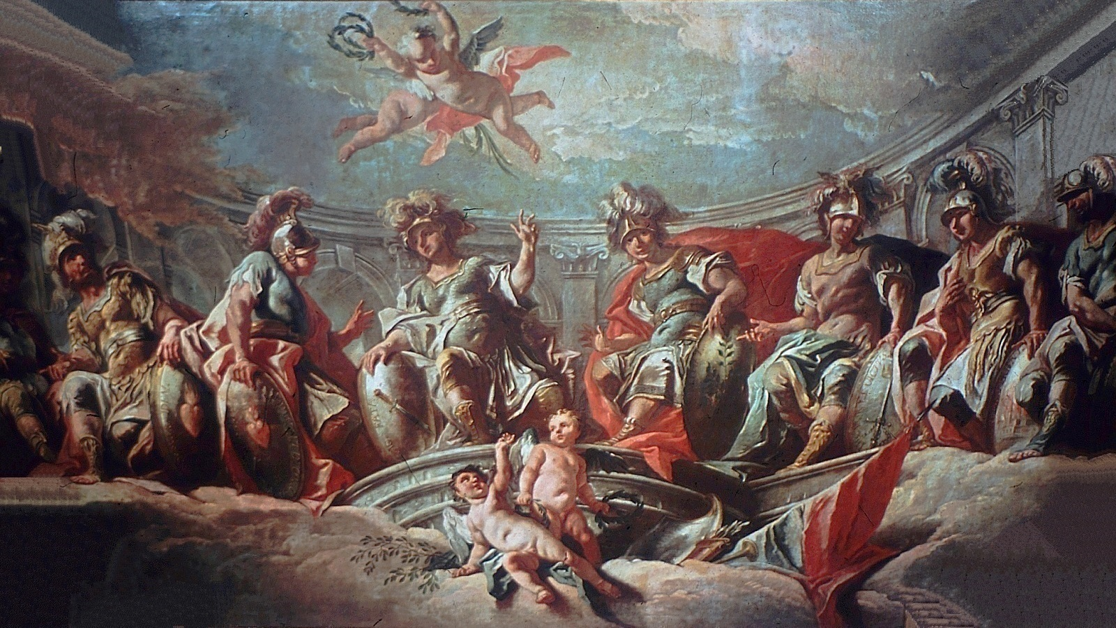 Schwäbisch Hall, Rathaus, Deckengemälde im Trausaal (Heldensaal) "Achilles, Patroclus, Hektor, Aeneas, Caesar, Pompejus, Scipio, Hannibal" o. "Achilles, Patroklos, Hektor, Aeneas, Romulus, Pompeius, Scipio, Fabius".jpg